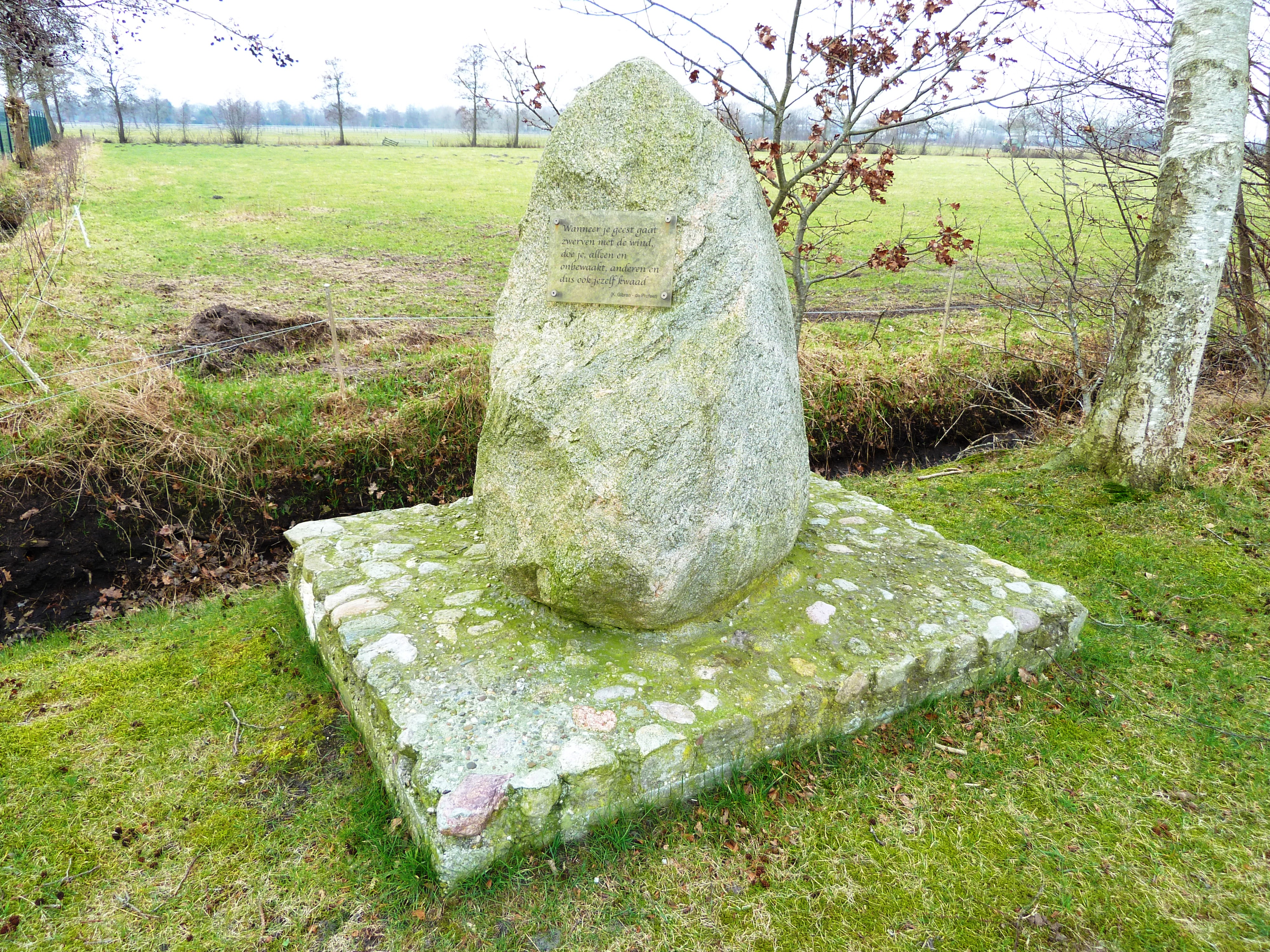 Gedenksteen voor de moord op vier veldwachters door IJje Wijkstra in 1928 aan de Polmalaan tussen Doezum en Kornhorn